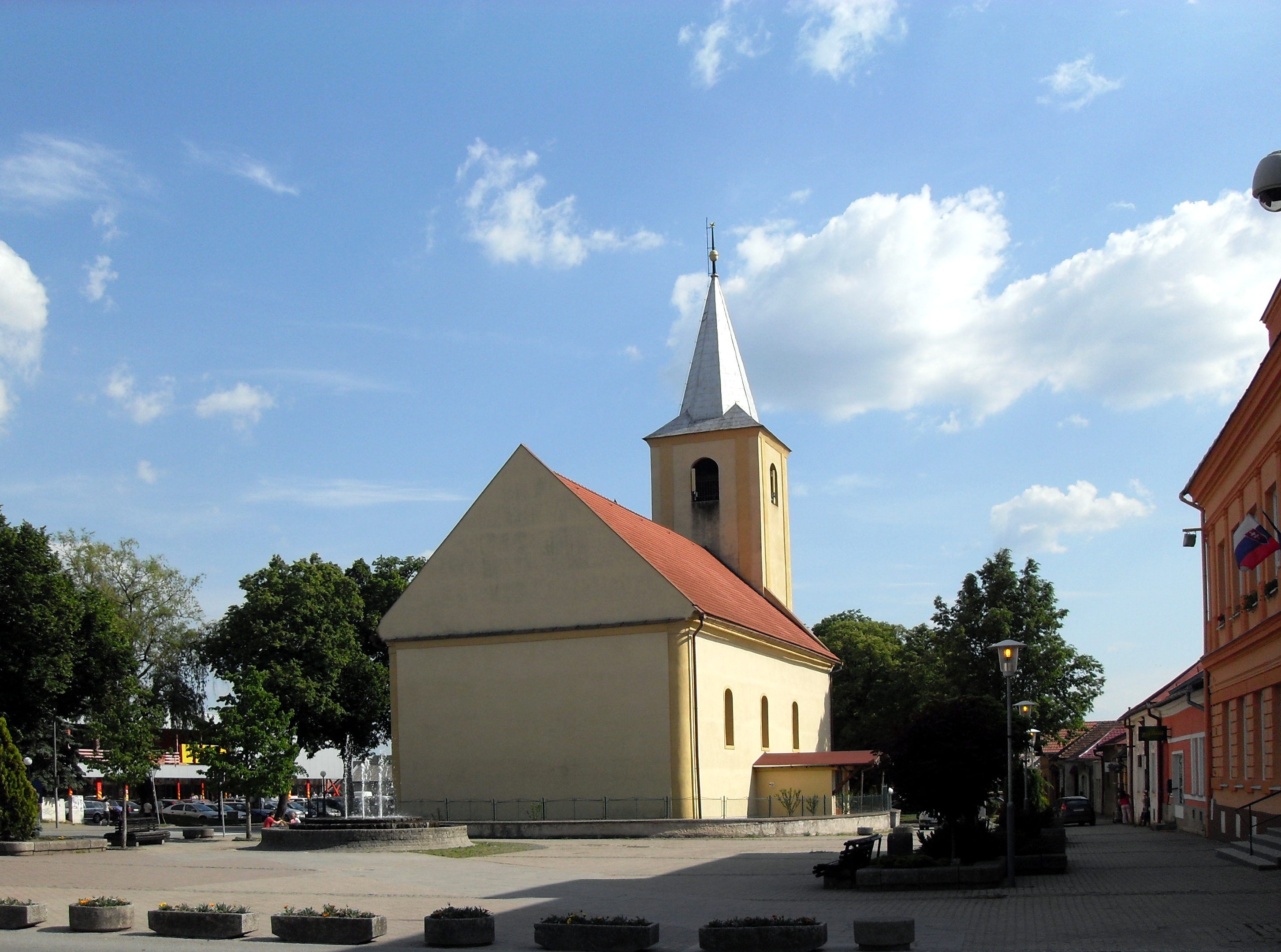 Moldava nad Bodvou, kostol reformovanej cirkvi